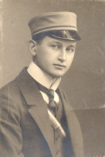 Porträtfotografie von Karl Haedenkamp (1889-1955)